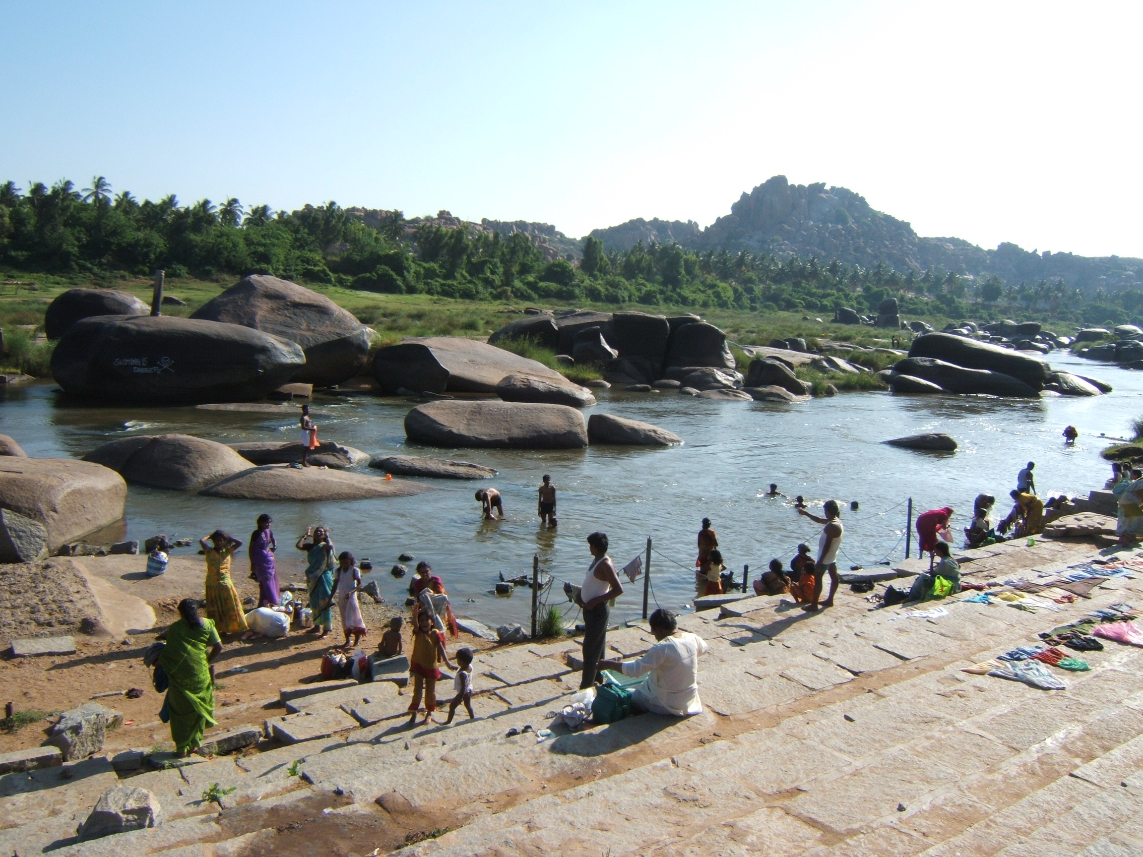 Hampi, Karnataka